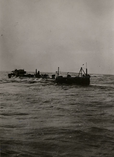 Lloyd Tanker Bruce Hudson, Adrift, Lake Erie.